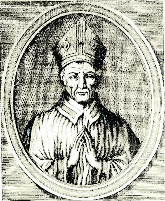 Cardinal Pierre Aycelin de Montaigu